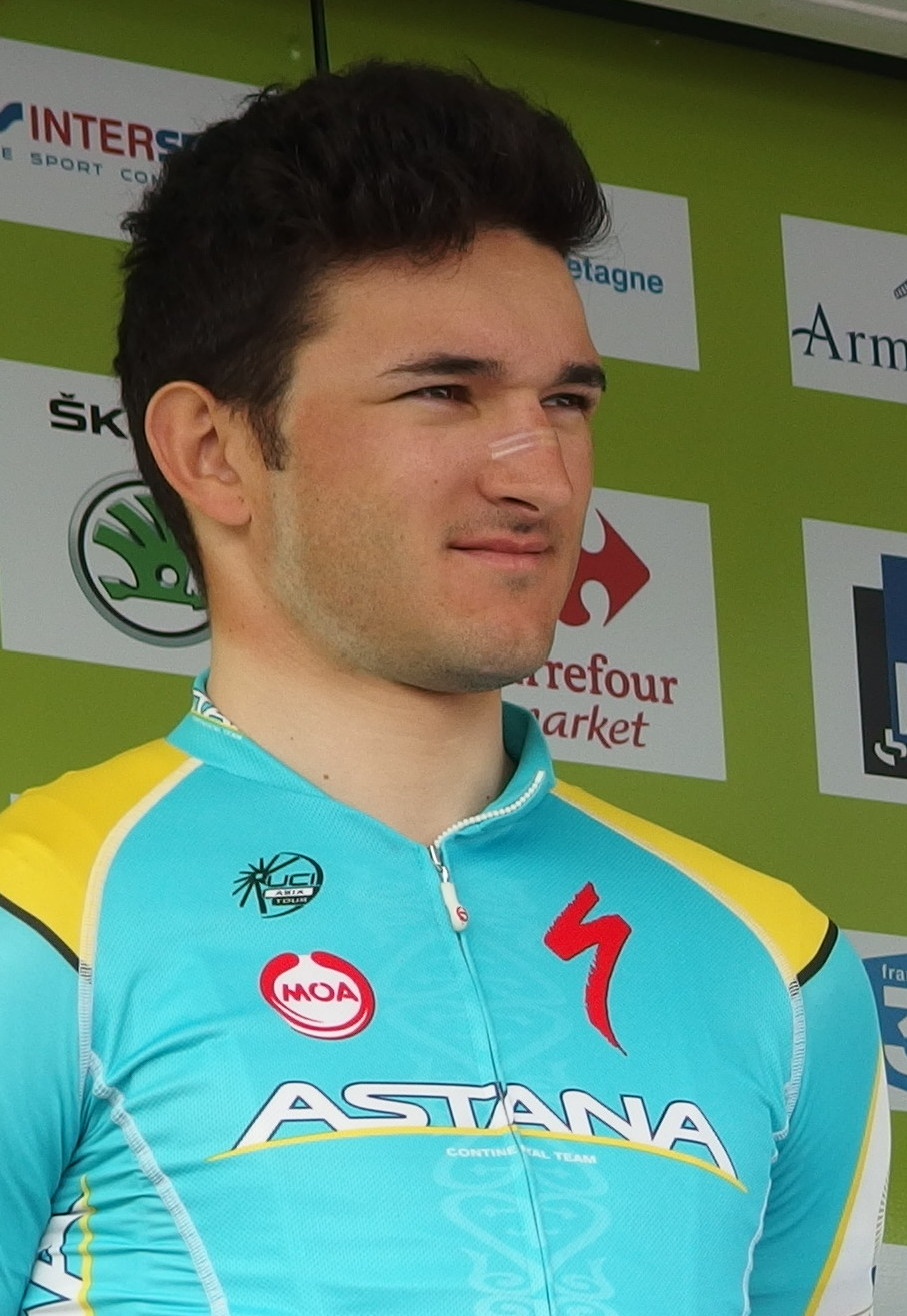 Tour de Bretagne 2014 - Présentation des équipes au départ de la sixième étape à Radenac - Équipe Astana Continental Depicted person: Marco Benfatto